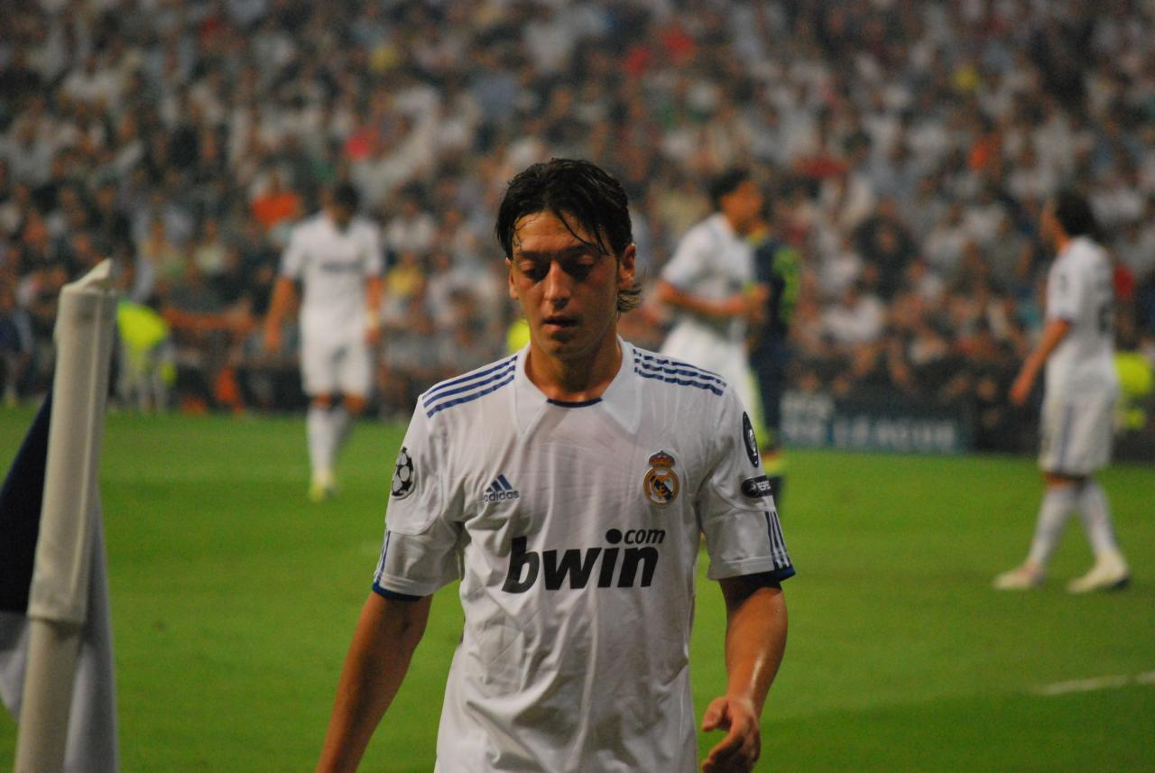 Primer partido de la Champions Legue Real Madrid 2 - Ajax 0 15 septiembre 2010